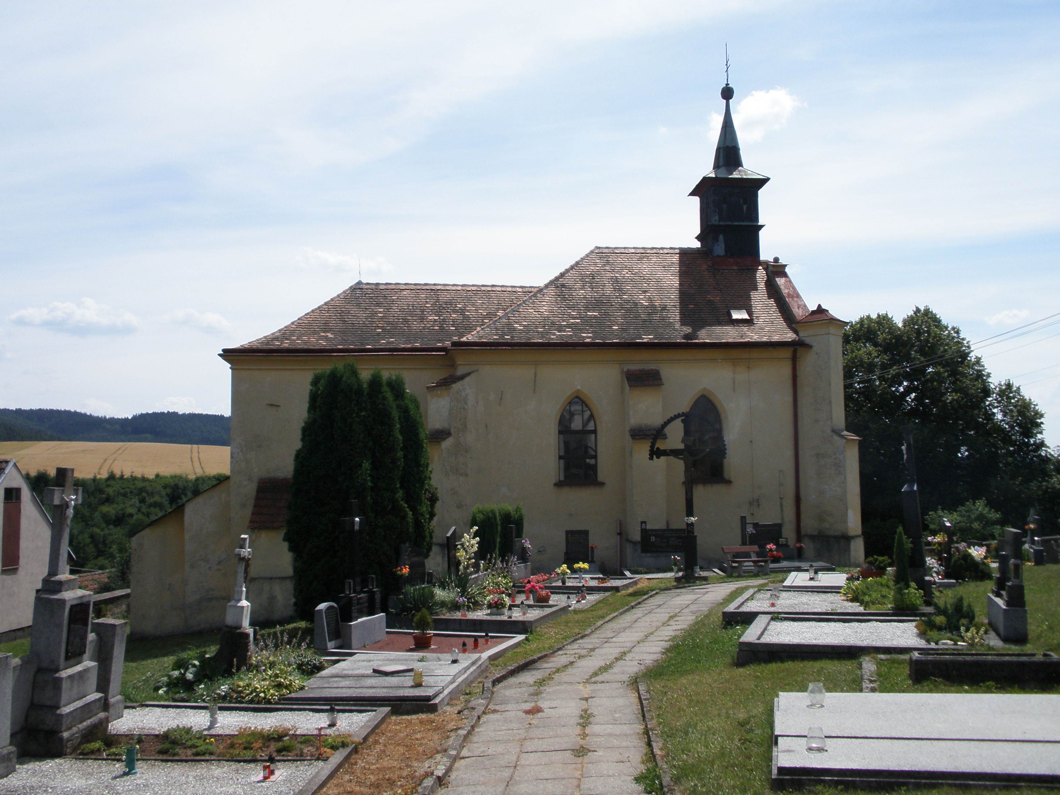 Kostel sv. Jiří (Kochov), Kochov